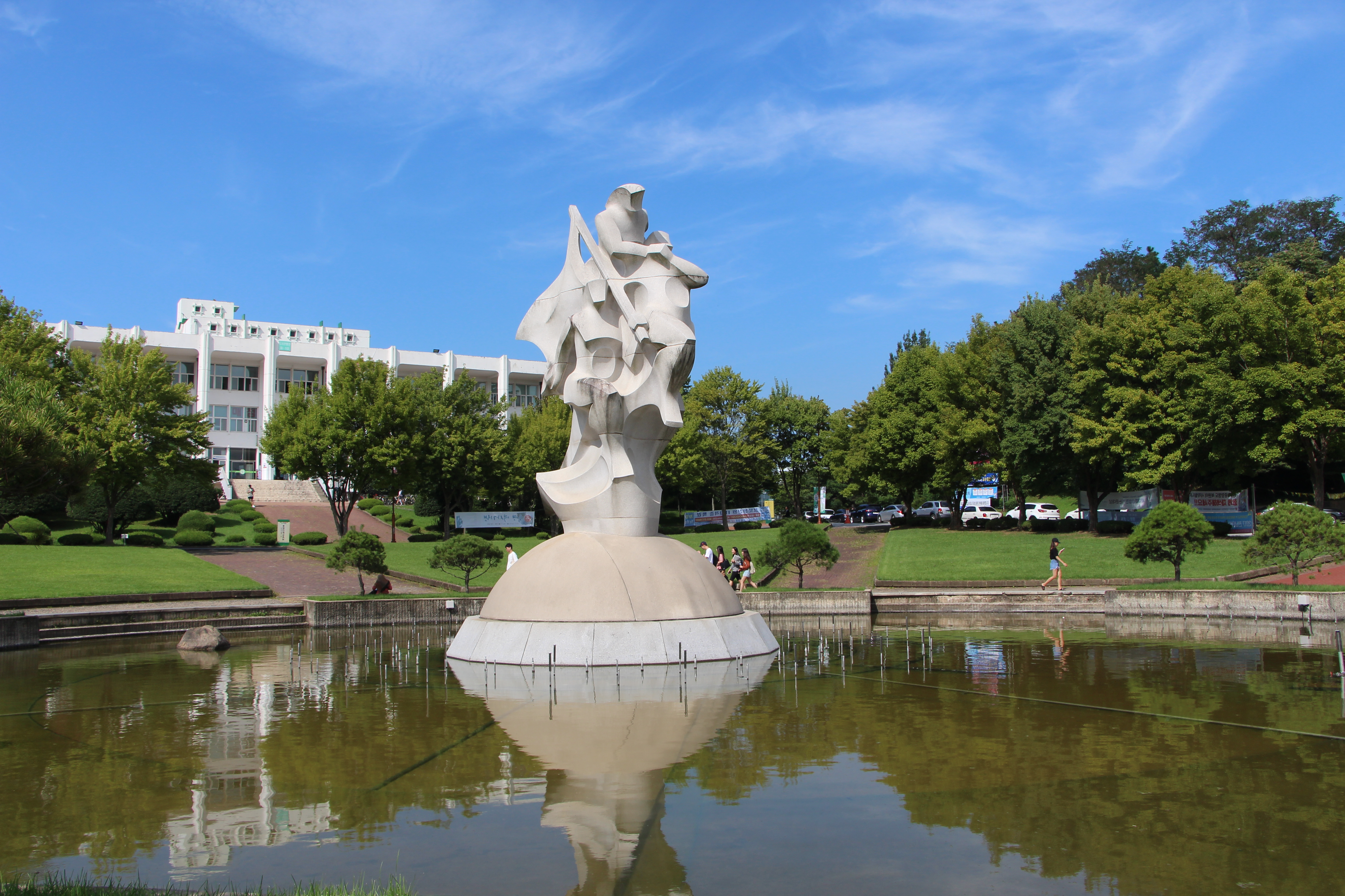 চন্নাম ন্যাশনাল ইউনিভার্সিটির বংজি ঝর্ণার সম্মুখভাগ